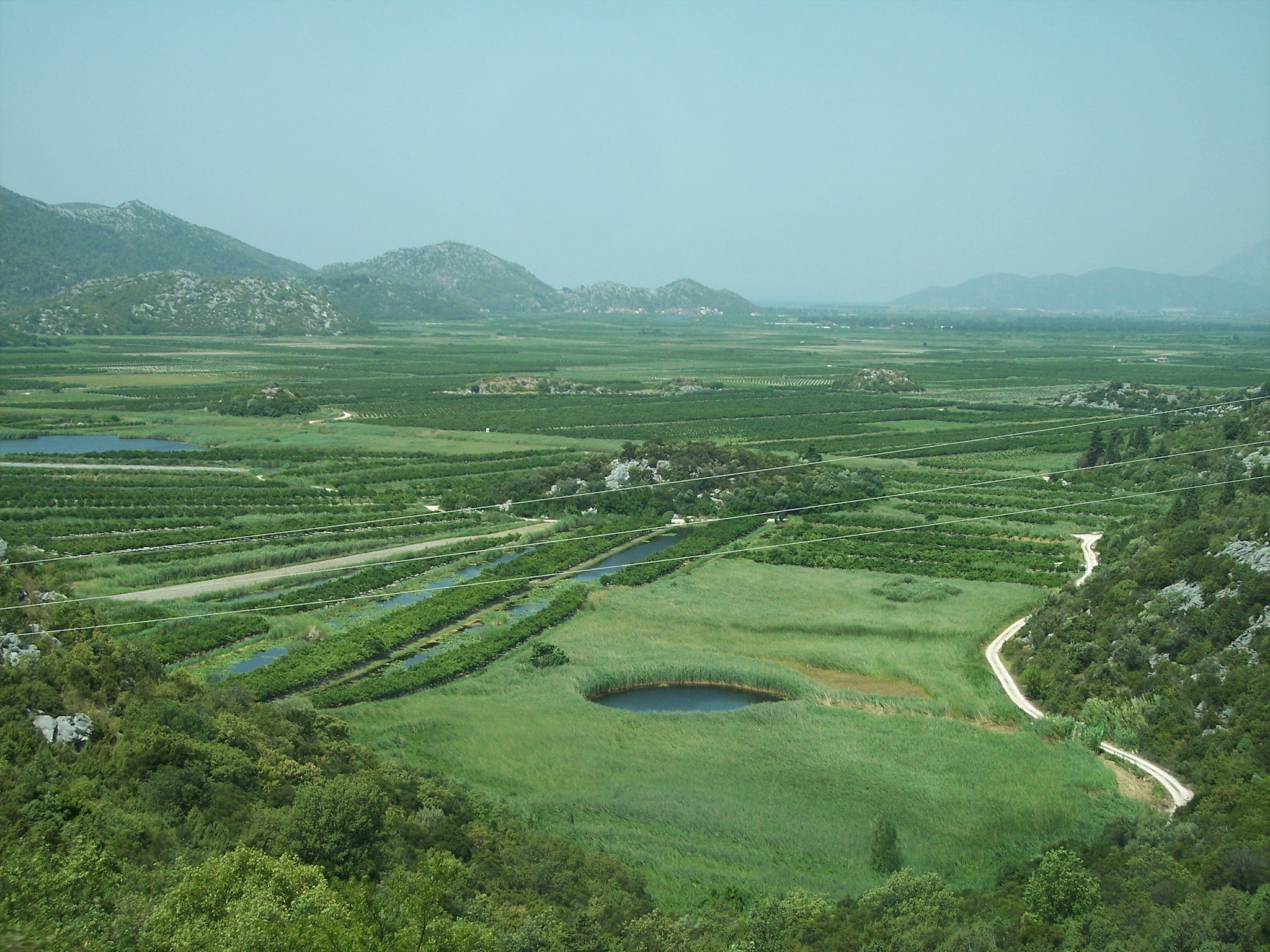 Agriculture near river Neretva in Croatia